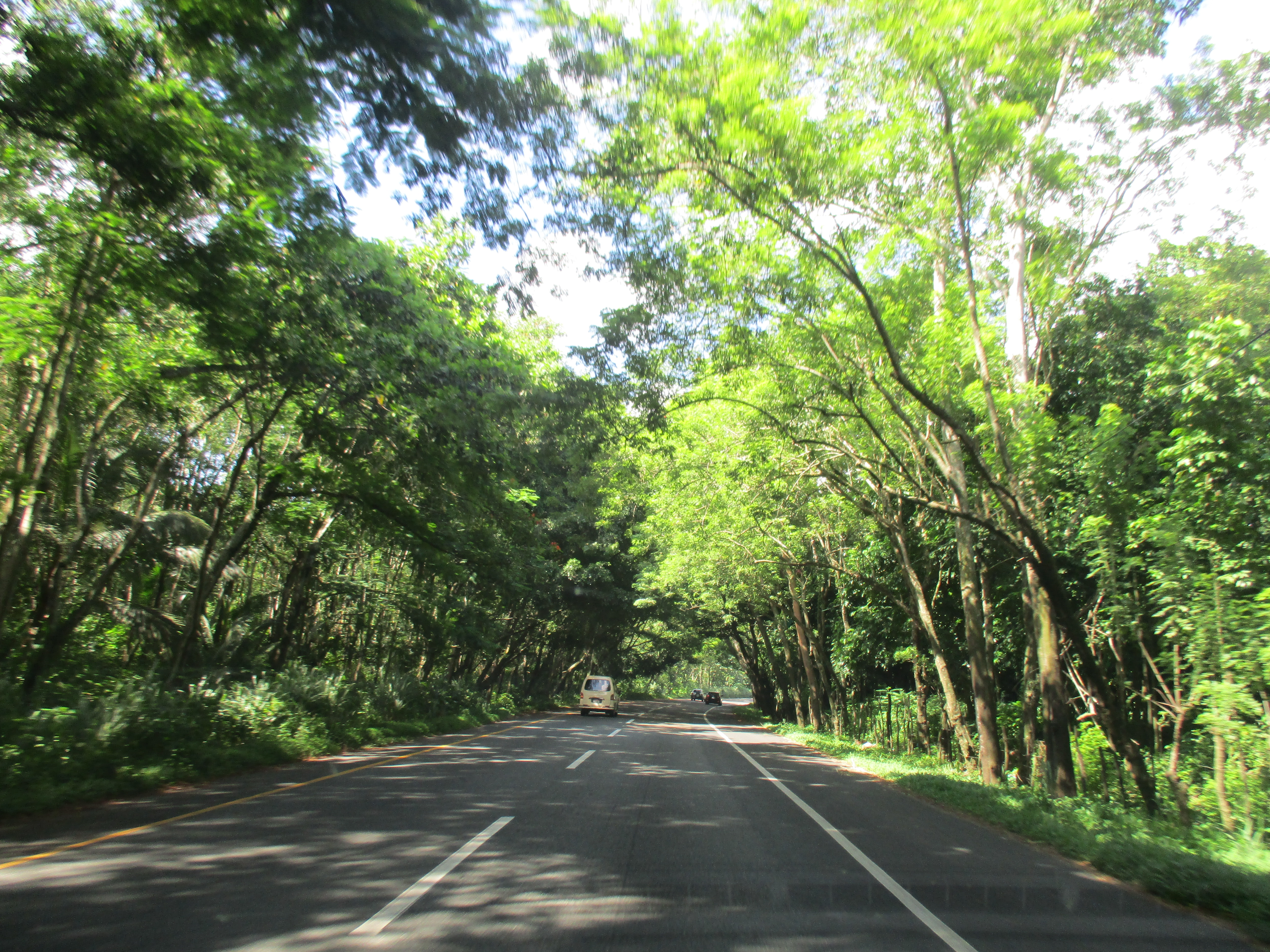 En la Autopista Duarte Visite